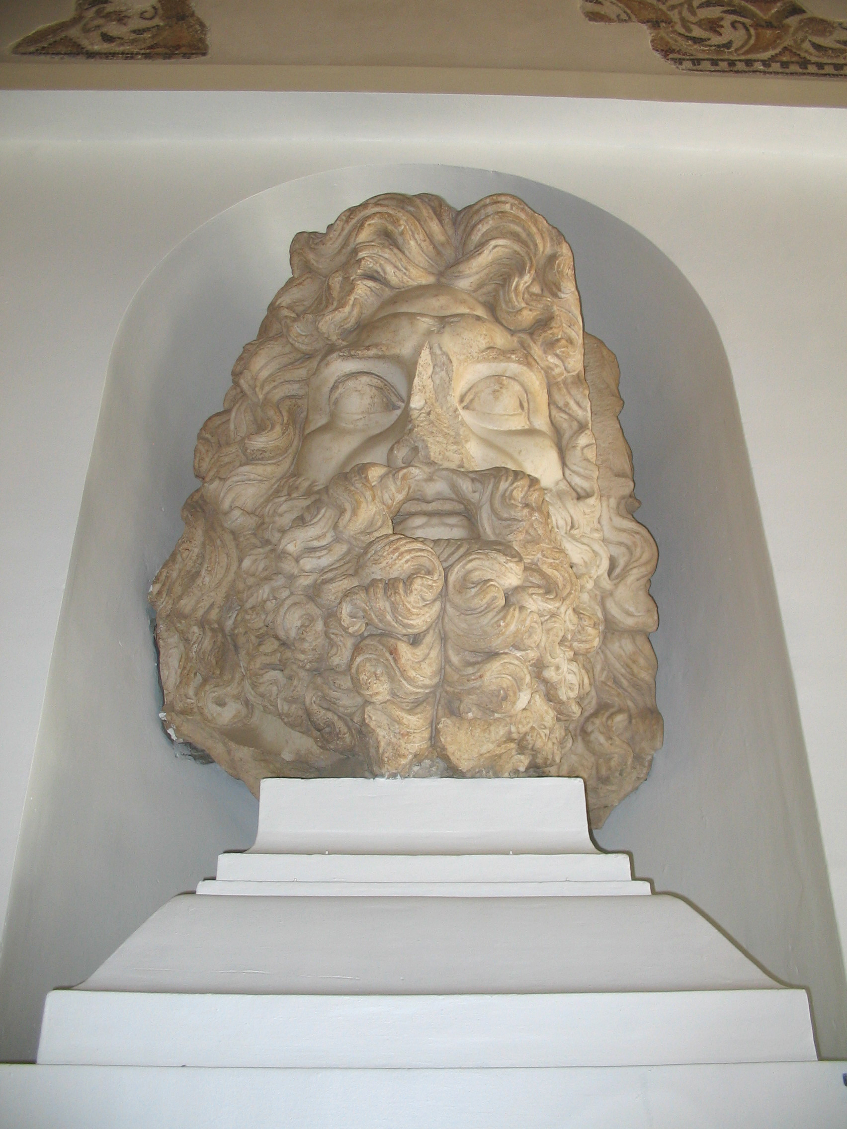 Giove, testa colossale, scultura romana III sec., ex Museo nazionale del Bardo,Tunisi.